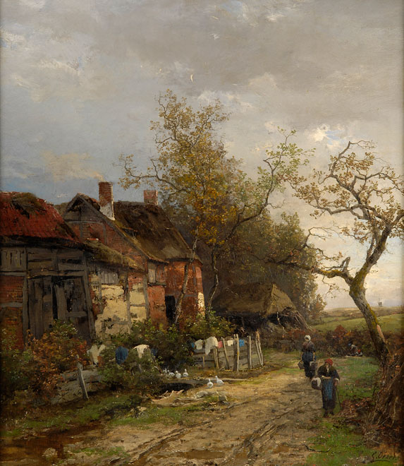 Georg Oeder: Morgens auf dem Lande. Signiert. Öl/Lwd., 75 x 66 cm